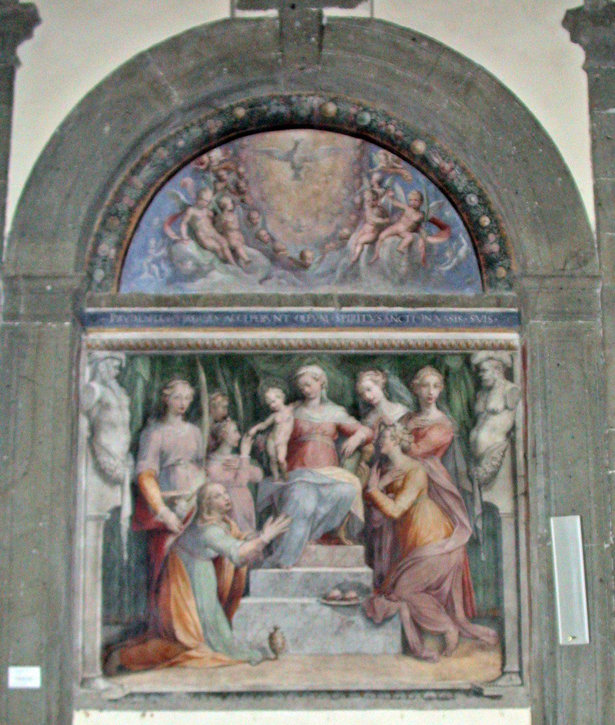 Italia, Regione Lazio, Provincia di Roma, Formello, piazza San Lorenzo, chiesa di San Lorenzo, interno, affresco di Donato Palmieri (anni 1570) con Maria in trono con Bambino, santa Caterina da Siena, santa Lucia, sant'Agata e altre Vergini Prudenti, nella navata sinistra.